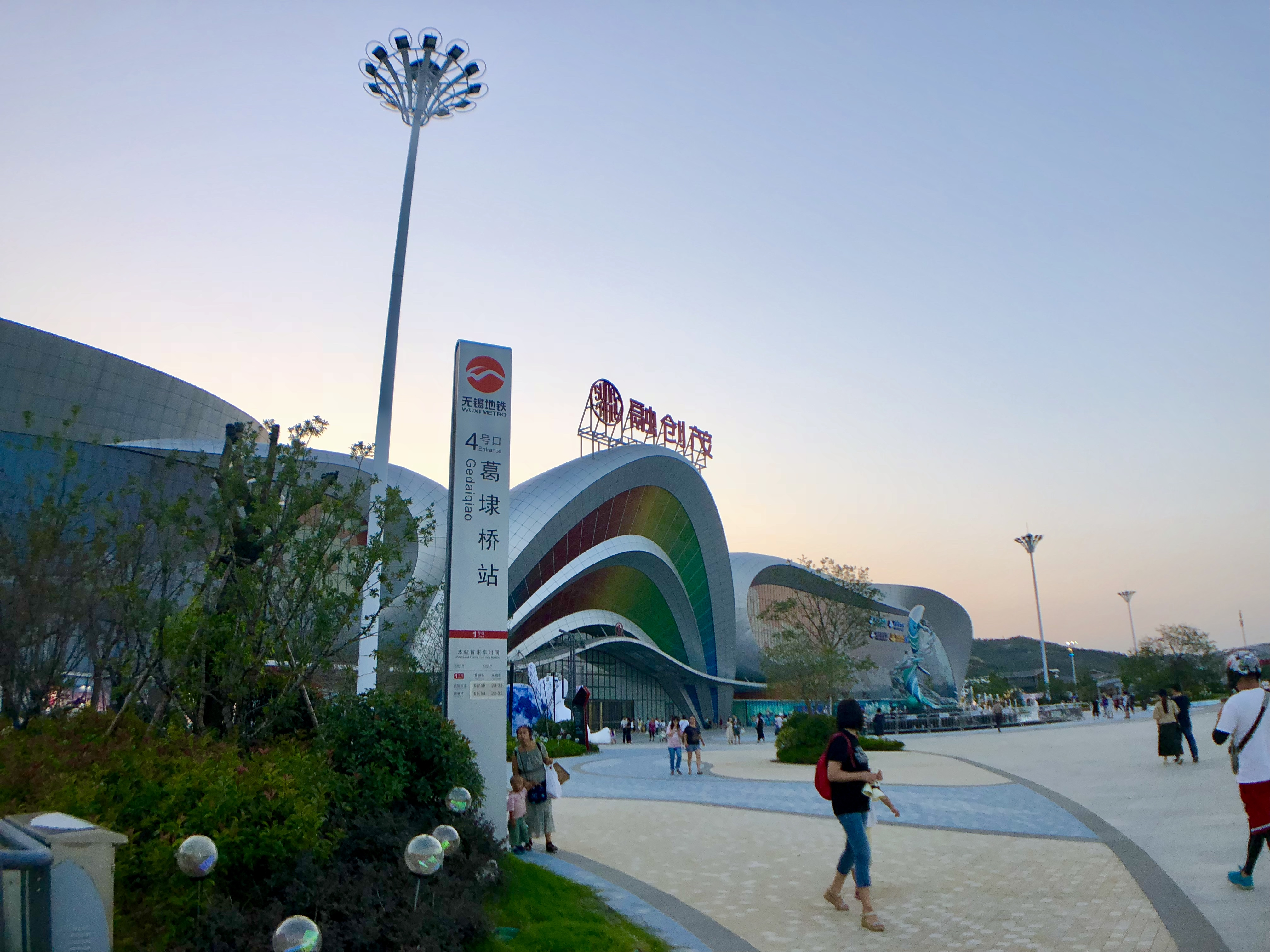 無錫地鐵1號線葛埭橋站4號出入口（融創文旅城）